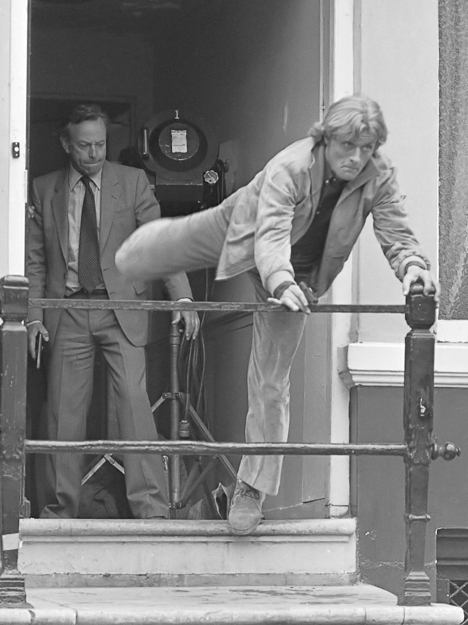 Opname film "Grijpstra en de Gier"; Rijk de Gooyer en Rutger Hauer 21 mei 1979